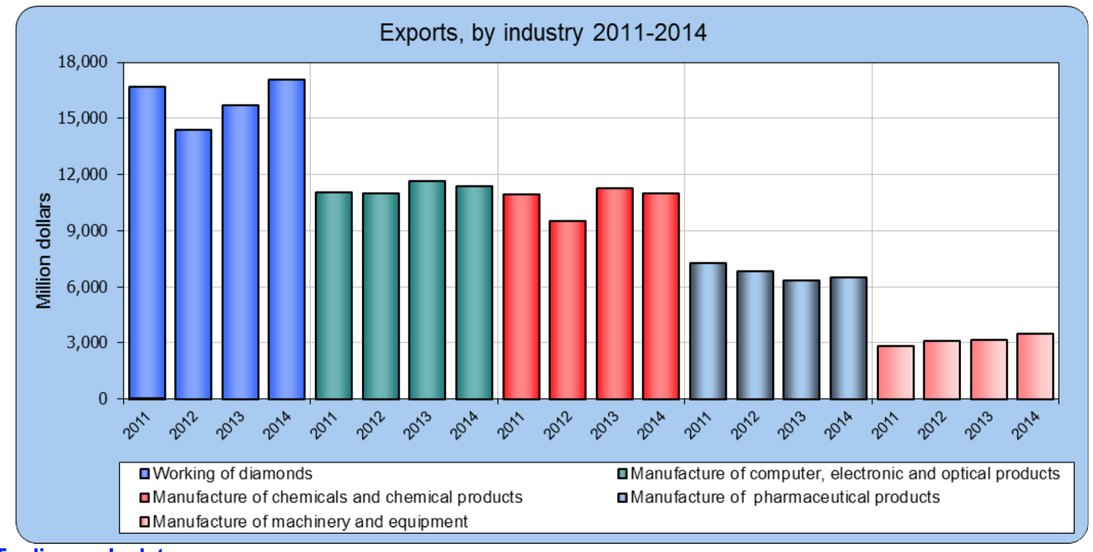 Tableau issu du "Central Bureau of Statistics of Israel", juillet 2015 Exports of Goods by Industry and Country, 2014 (In 2014, exports of goods totaled $69.0 billion, an increase of 3.3% compared to 2013)